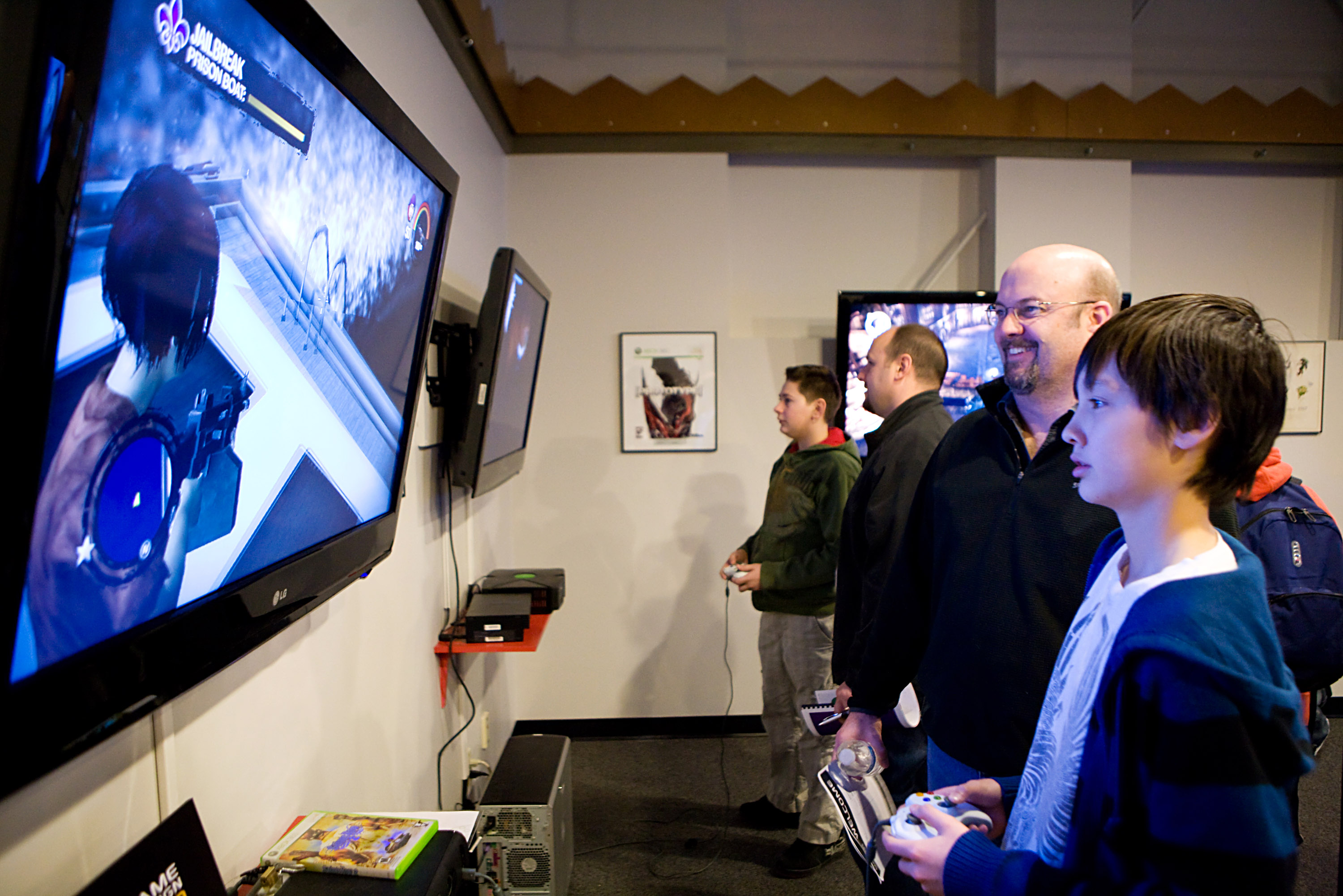 Игрок в компьютерную игру